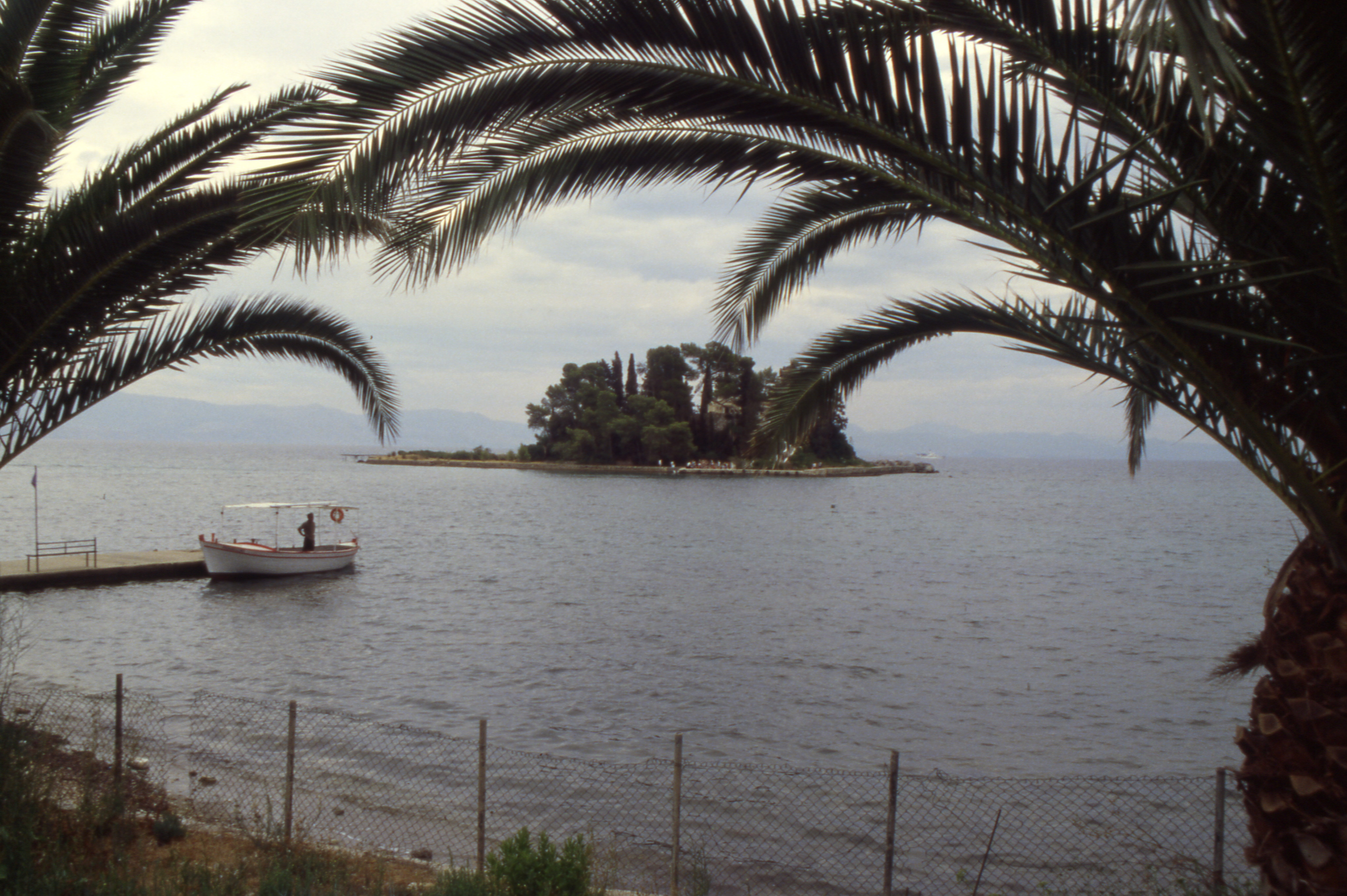 Korfu / Mäuseinsel